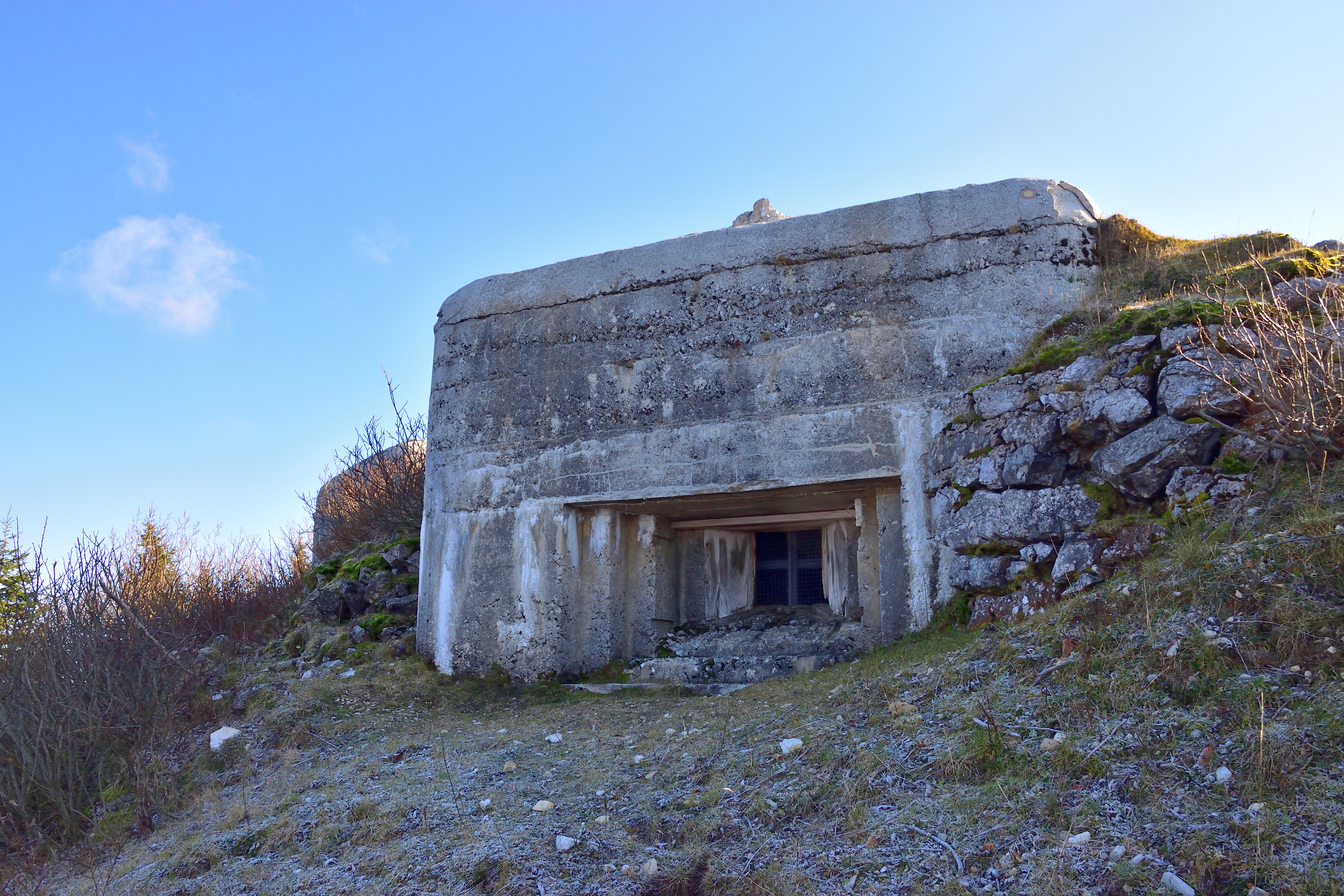 Topniški bunker pod vrhom Blegoša. Bunker je del Rupnikove linije in je bil zgrajen med obema svetovnima vojnama za potrebe varovanja rapalske meje. Danes so v njem prostori radioamaterjev.